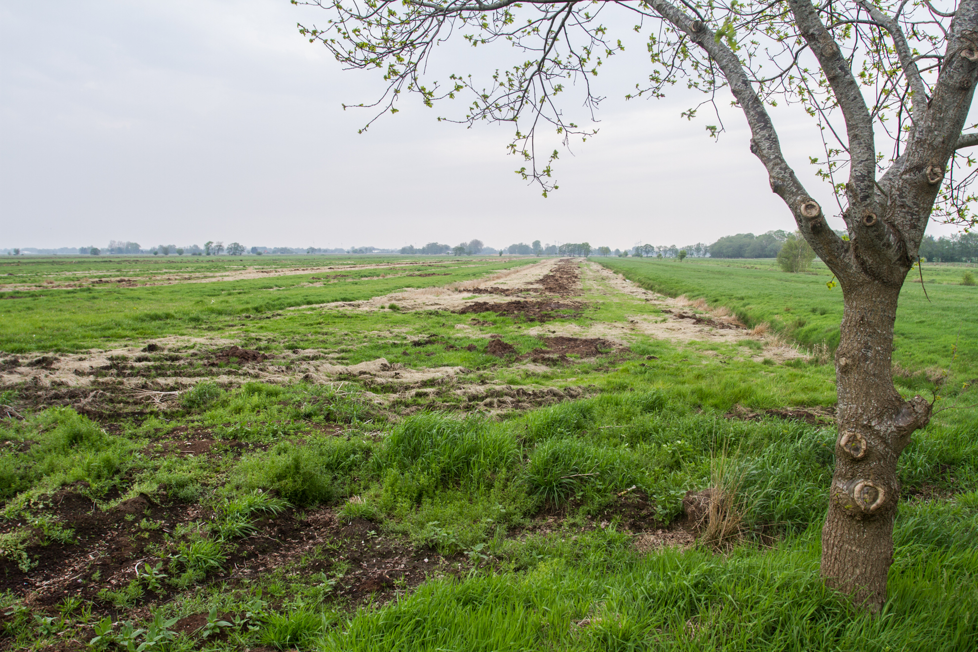 Impression des Naturschutzgebietes „Aßbütteler Moor“ bei Wanna.